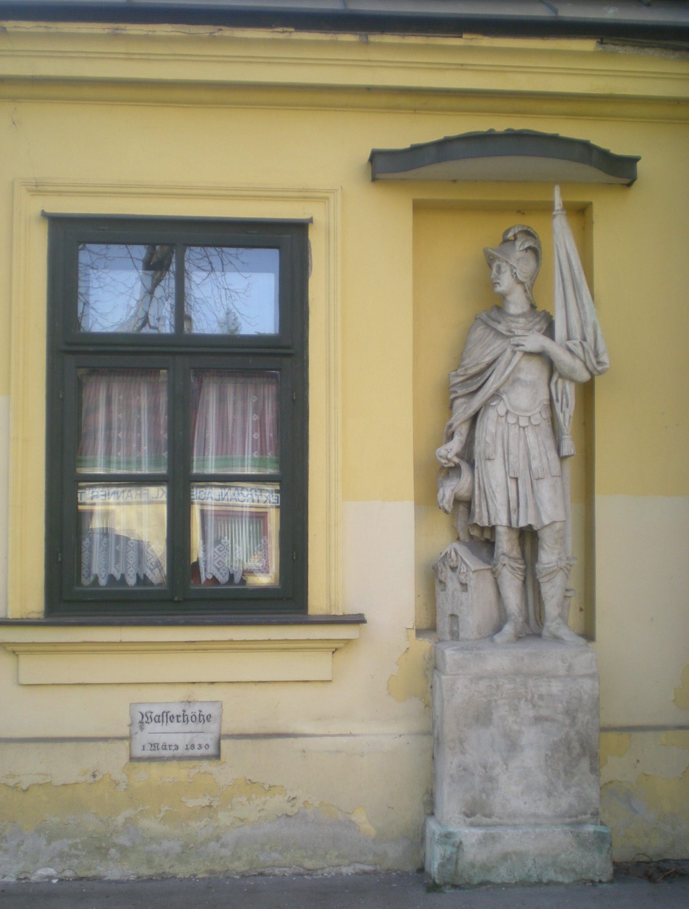 Florian-Statue und Hochwassermarke an der Beethoven-Gedenkstätte Erdödy-Landgut in Wien-Floridsdorf